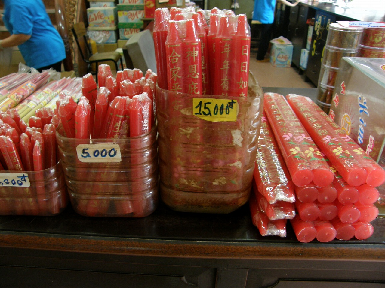 商売の神、関帝が祀られ商売繁盛を祈願する人で賑わう。祭壇には電飾があしらわれ、派手な装飾が施されている。渦巻状の線香が吊るされる。 住所：184 D Hung Vuong 時間：6:00～17:00